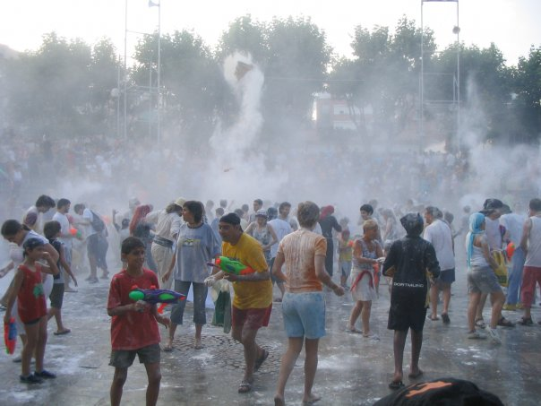 Batalla de harina en la que los premianenses echan del pueblo a los piratas.